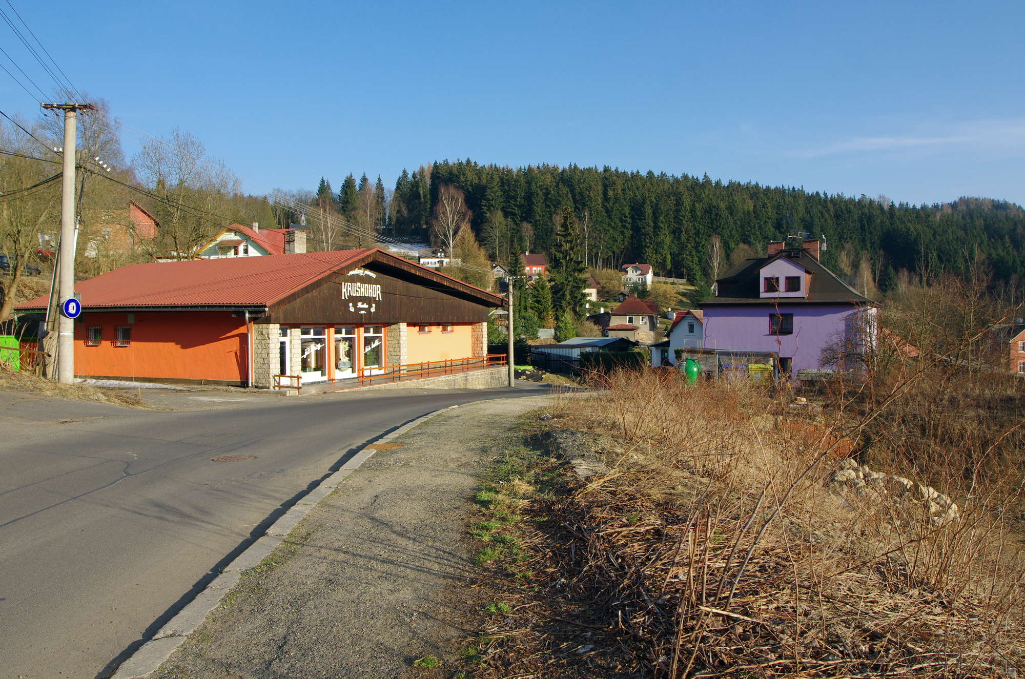 Tisová (část města Kraslic), okres Sokolov